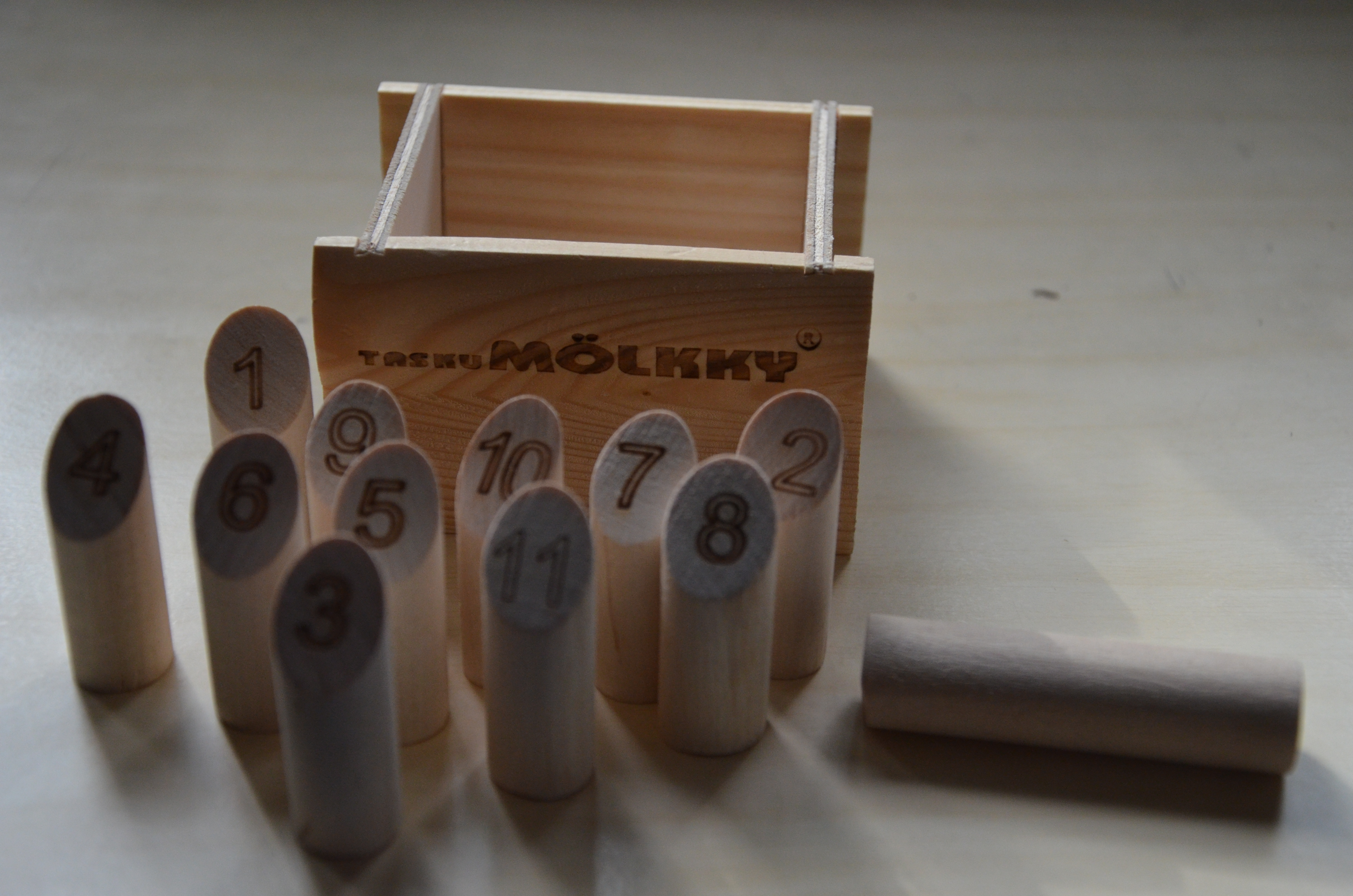 Taskumölkky. Heittokapula, mölkky, on n. 6 cm pituinen.